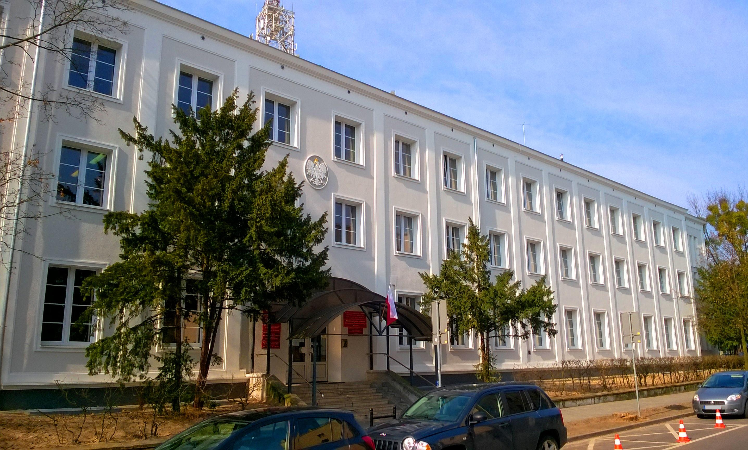 Budynek Urzędu Wojewódzkiego w Toruniu